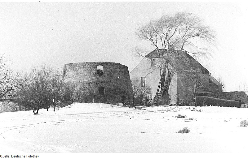 Original image description from the Deutsche Fotothek Görlitz-Klingewalde. Mühlenruine